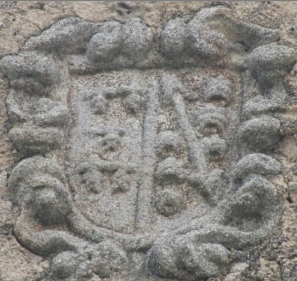 Escudo de armas, probablemente perteneciente al Sr. Duque de Alburquerque, dueño del campo de Barceo y Barceíno durante la Alta Edad Media y Edad Moderna.